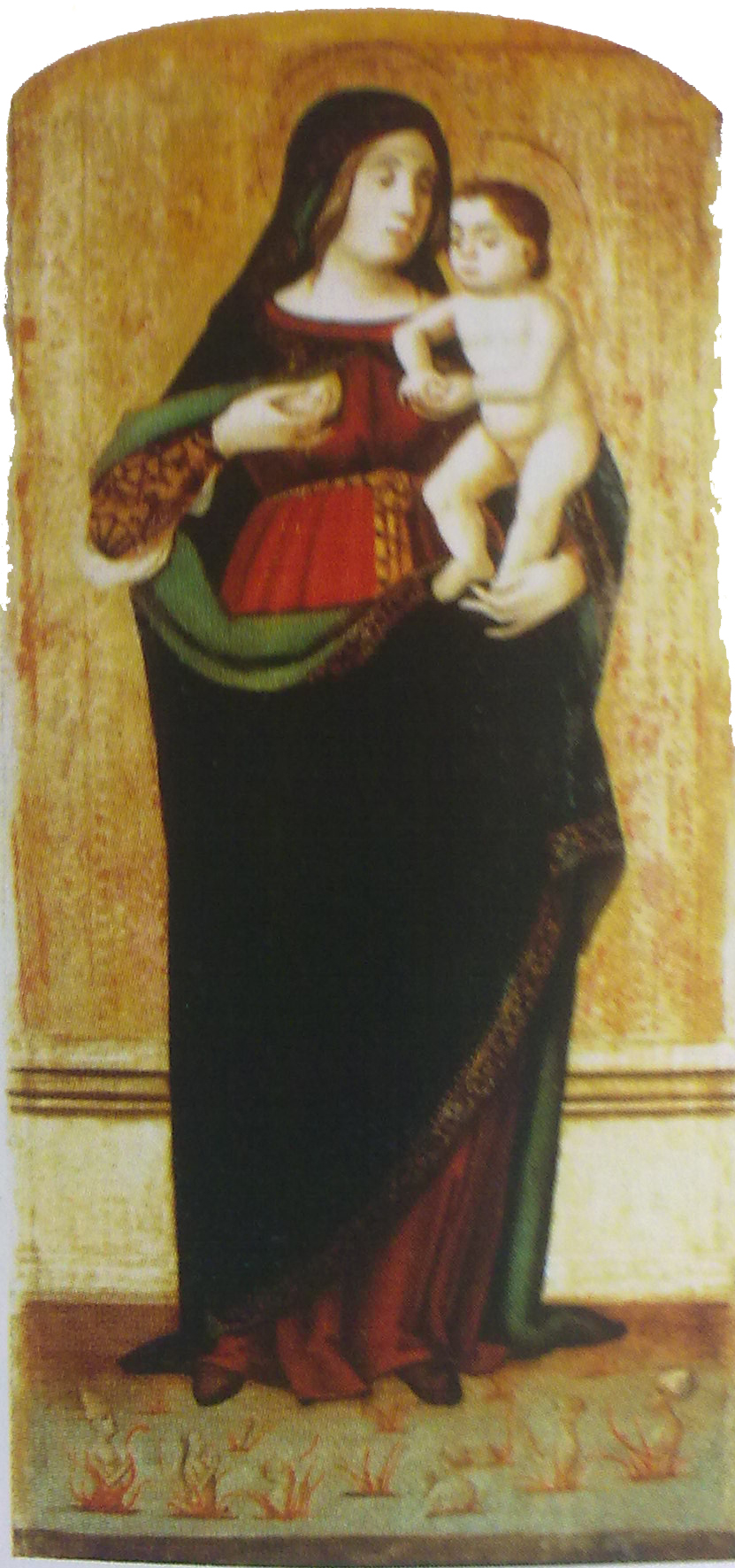 Pinacoteca del convento di Sant'Antonio, Nocera Inferiore. Madonna con Bambino tra le anime purganti. Ignoto del XVI secolo.